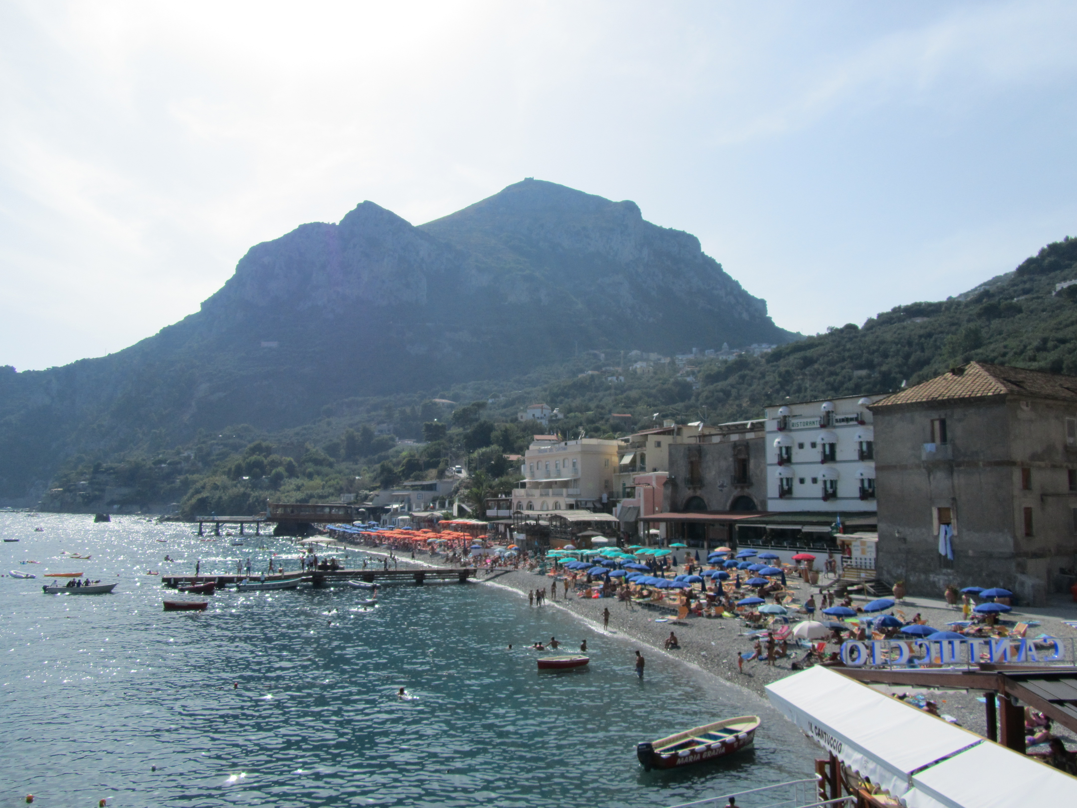 Costiera Sorrentina (Nerano, Massa Lubrense - NA)